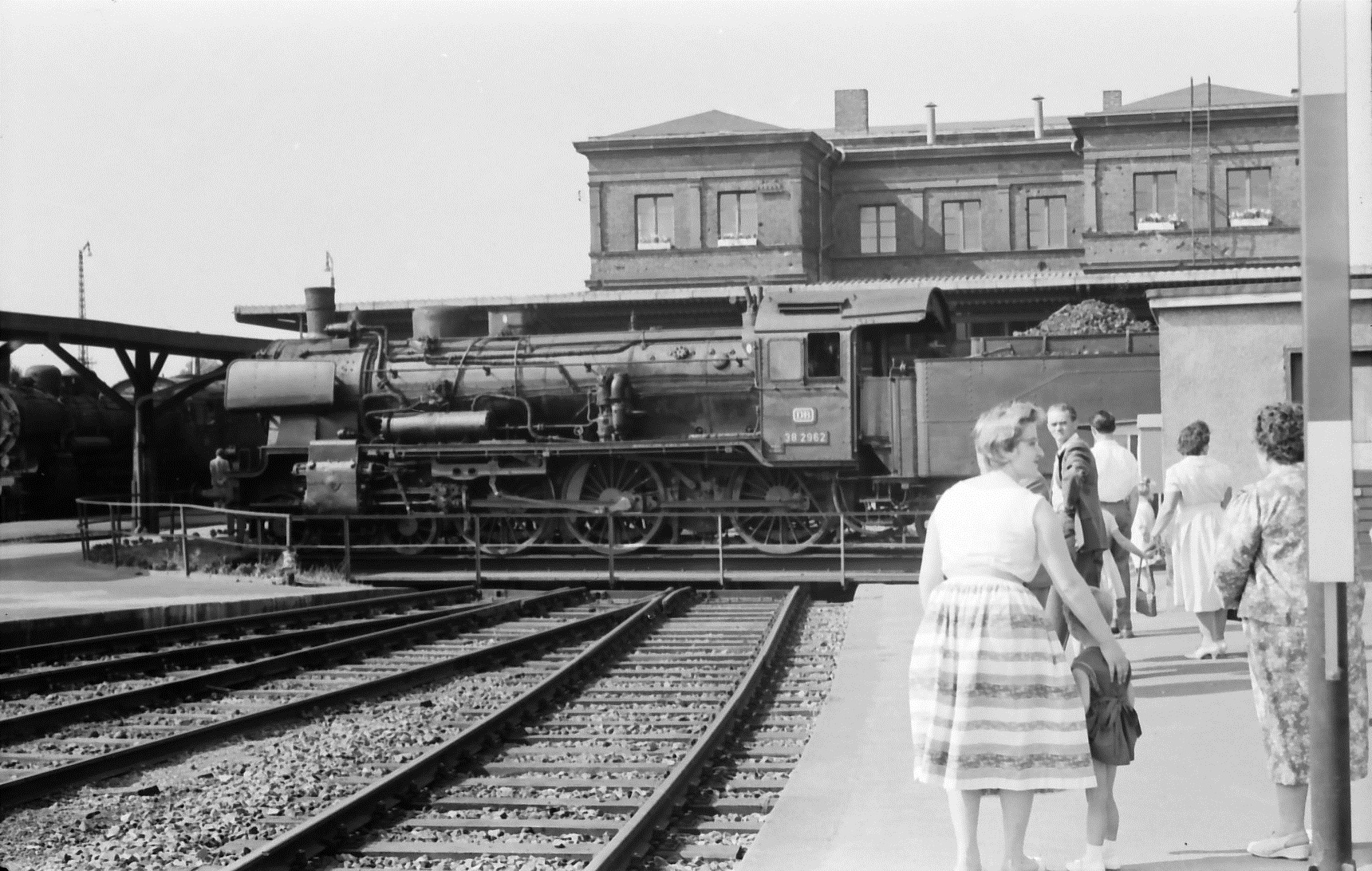 Dampflok 38 2962 wird auf der Drehscheibe im Bahnhof Düren gedreht, Sommer 1965